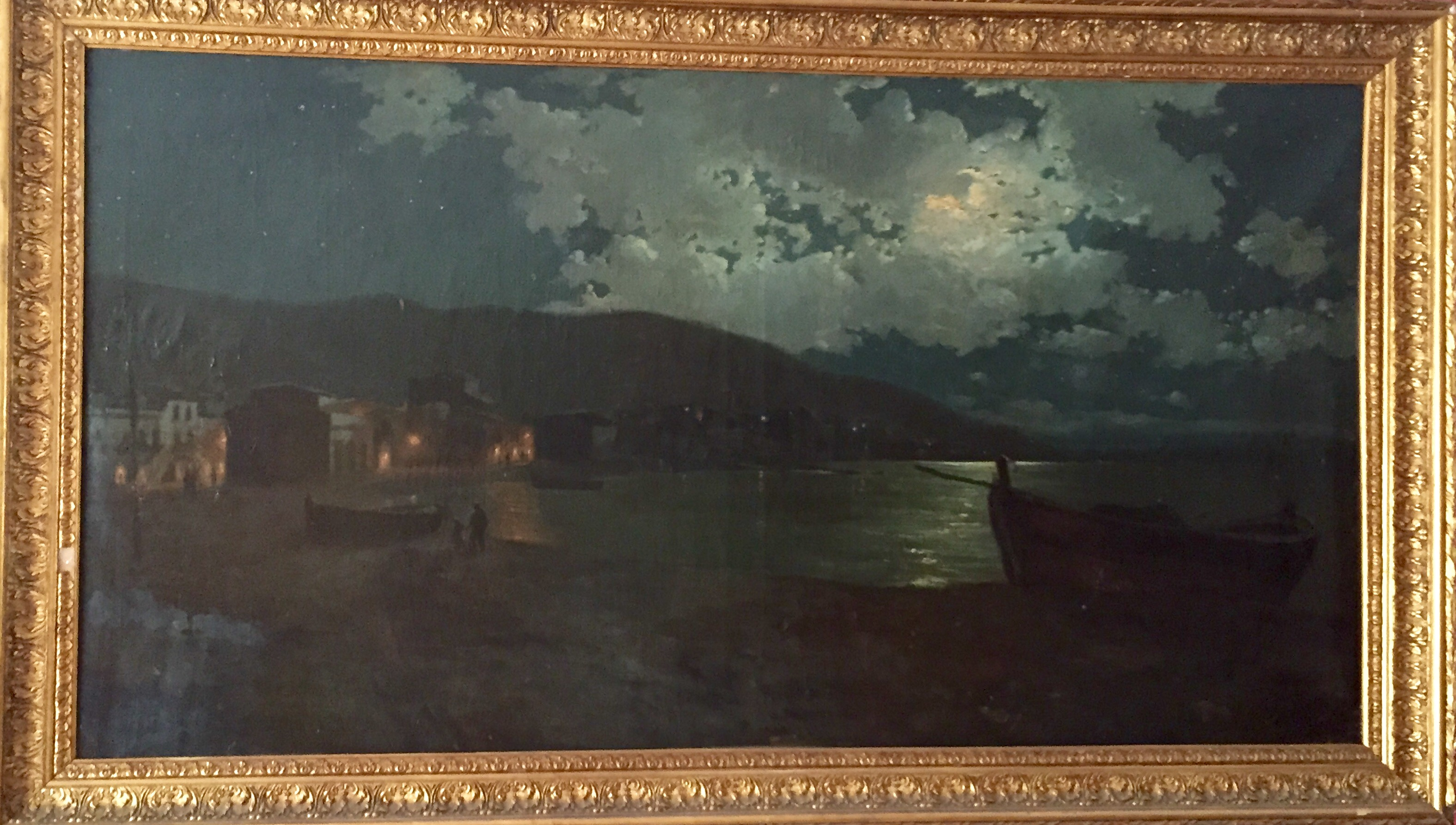 Realizado en la última década del siglo XIX, pues se aprecia en el lienzo todavía la iluminación a gas, antes de la llegada de la electricidad a la ciudad